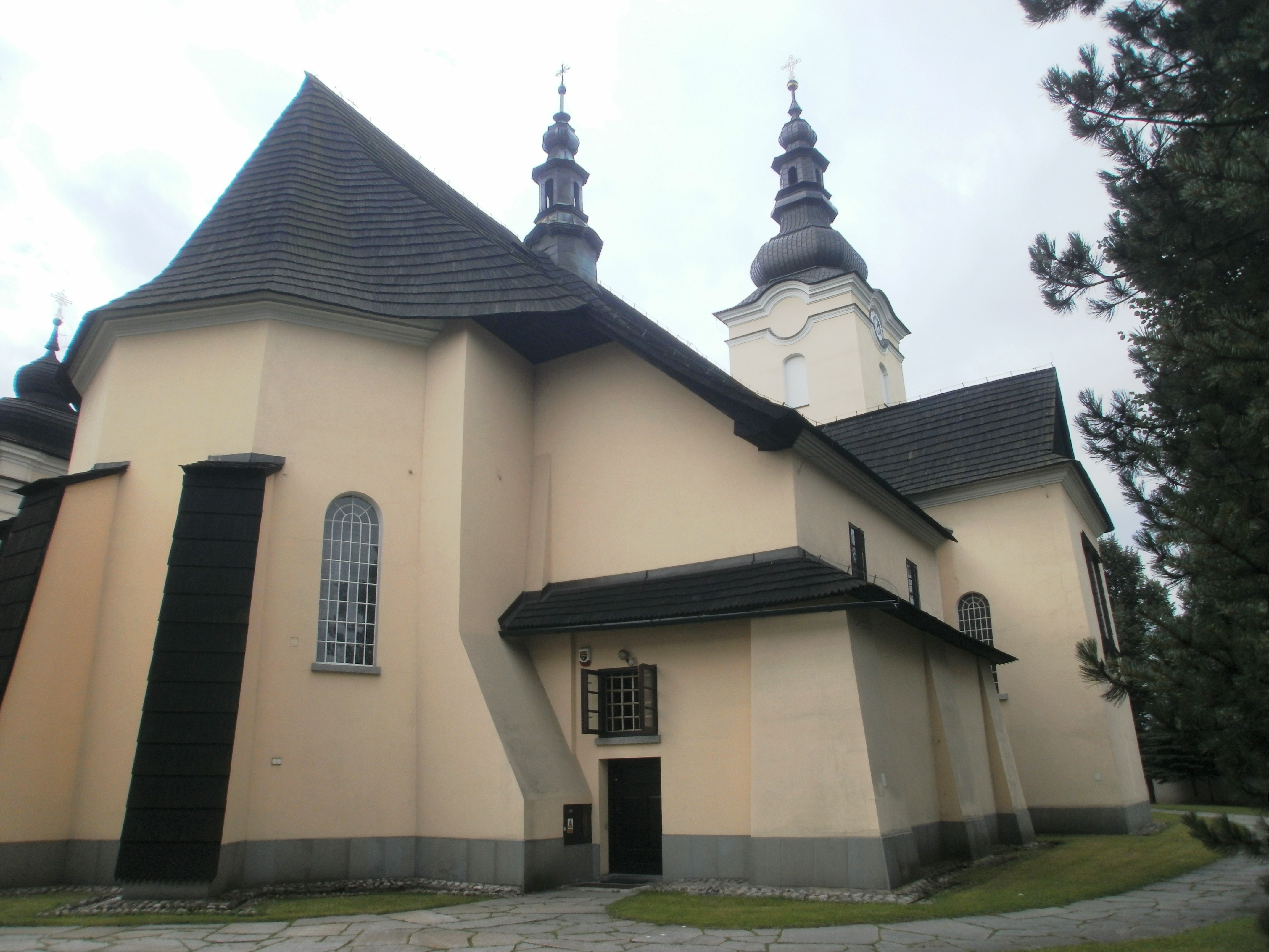 Nowy Targ, kościół par. p.w. św. Katarzyny, XIV, 1765